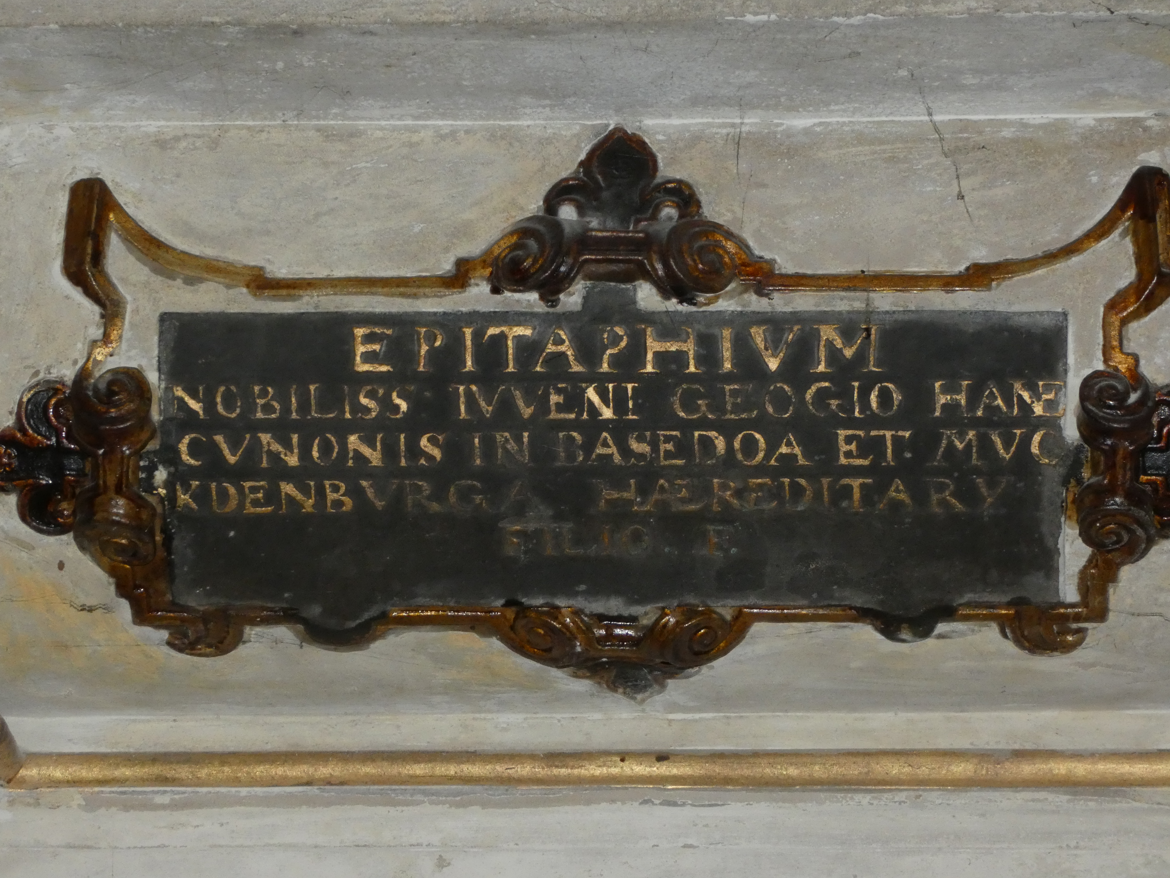 Epitaph Georg Cuno Hahn von Basedow Details